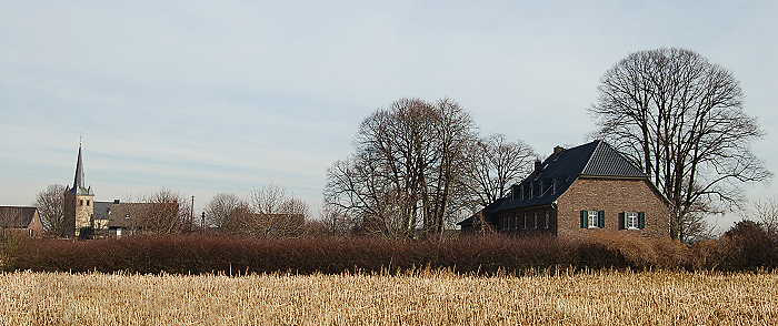 Ansicht von Rommerskirchen-Oekoven mit der St. Briktiuskirchen und dem Gereonshof